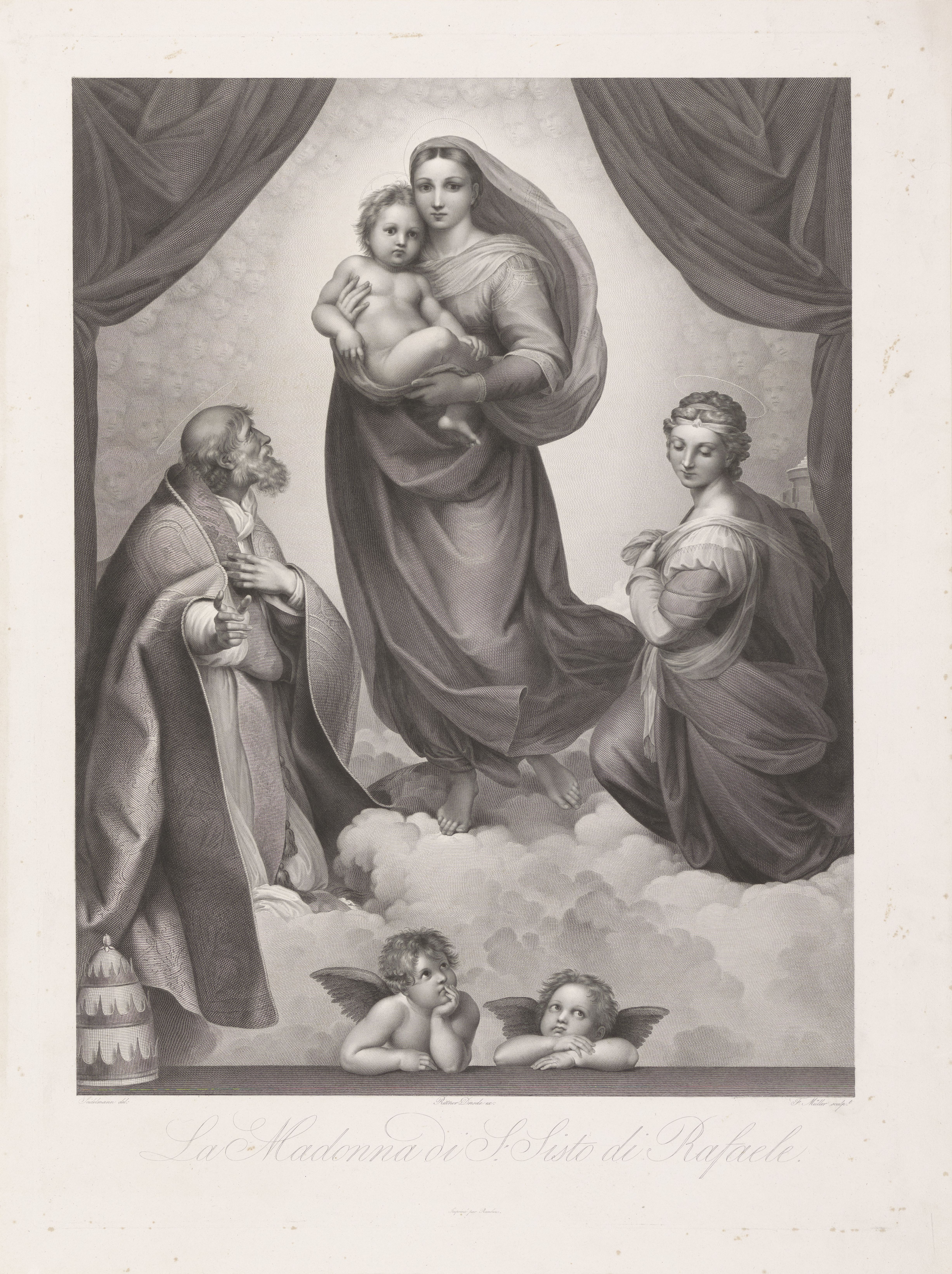 IdentificatieTitel(s): Maria met kind tussen twee heiligen, naar RaphaëlObjecttype: prent Objectnummer: RP-P-OB-70.886VervaardigingVervaardiger: prentmaker: Johann Friedrich Wilhelm Müllernaar schilderij van: Rafaëlnaar tekening van: Apollonia Seydelmann-de Forgueuitgever: Henri Rittnerdrukker: RambozDatering: 1792 - 1816Fysieke kenmerken: ets en gravureMateriaal: papier Techniek: etsen / graveren (drukprocedé)Verwerving en rechtenVerwerving: onbekendCopyright: Publiek domein